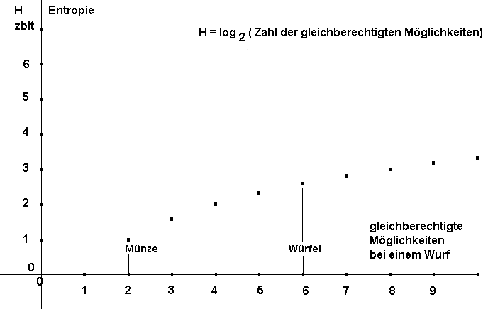 Das Bild stammt von Benutzer:Rho. Es wurde von ihm selbst erstellt und ist public.domain.